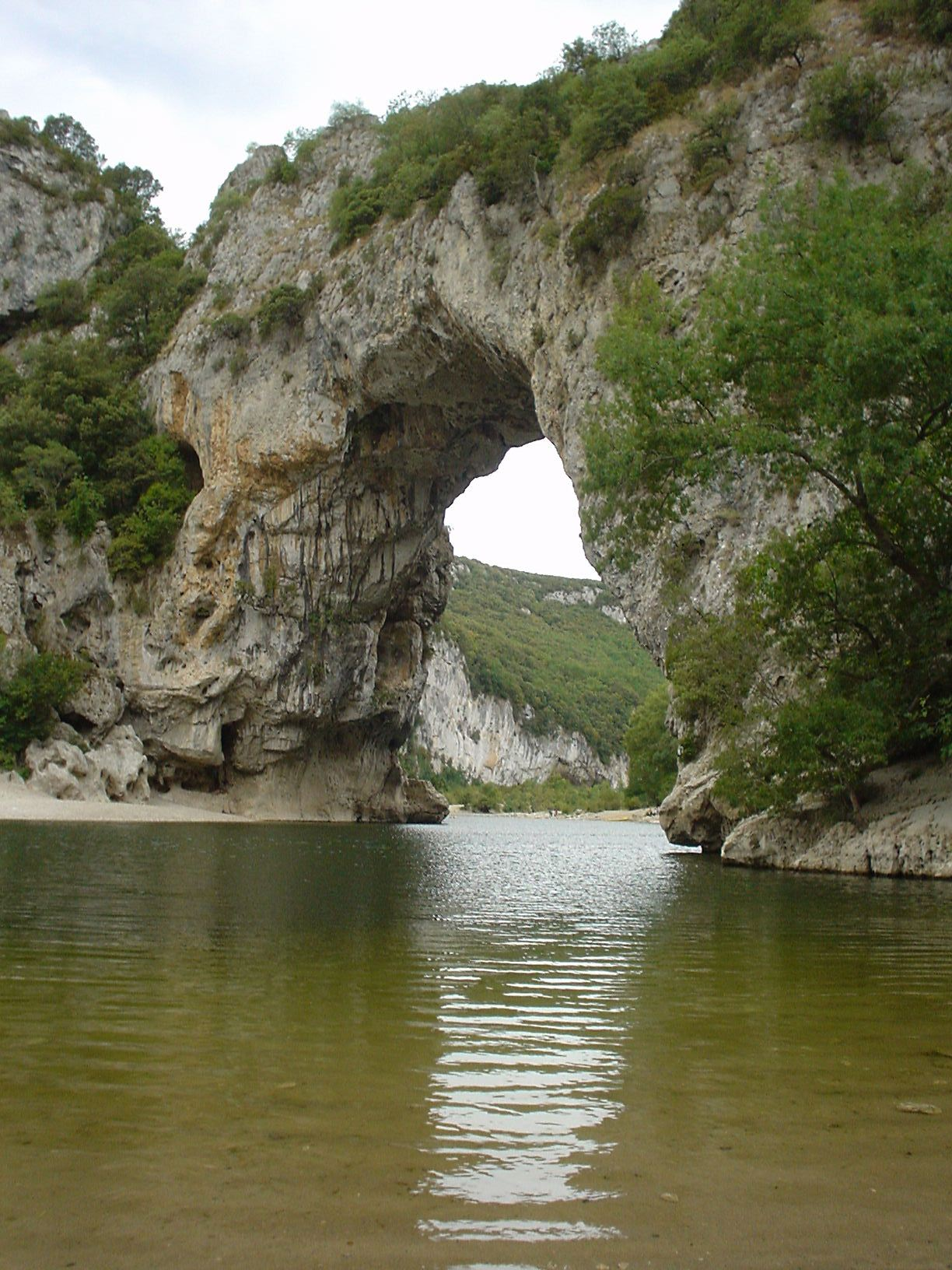 Pont d'Arc/Frankreich